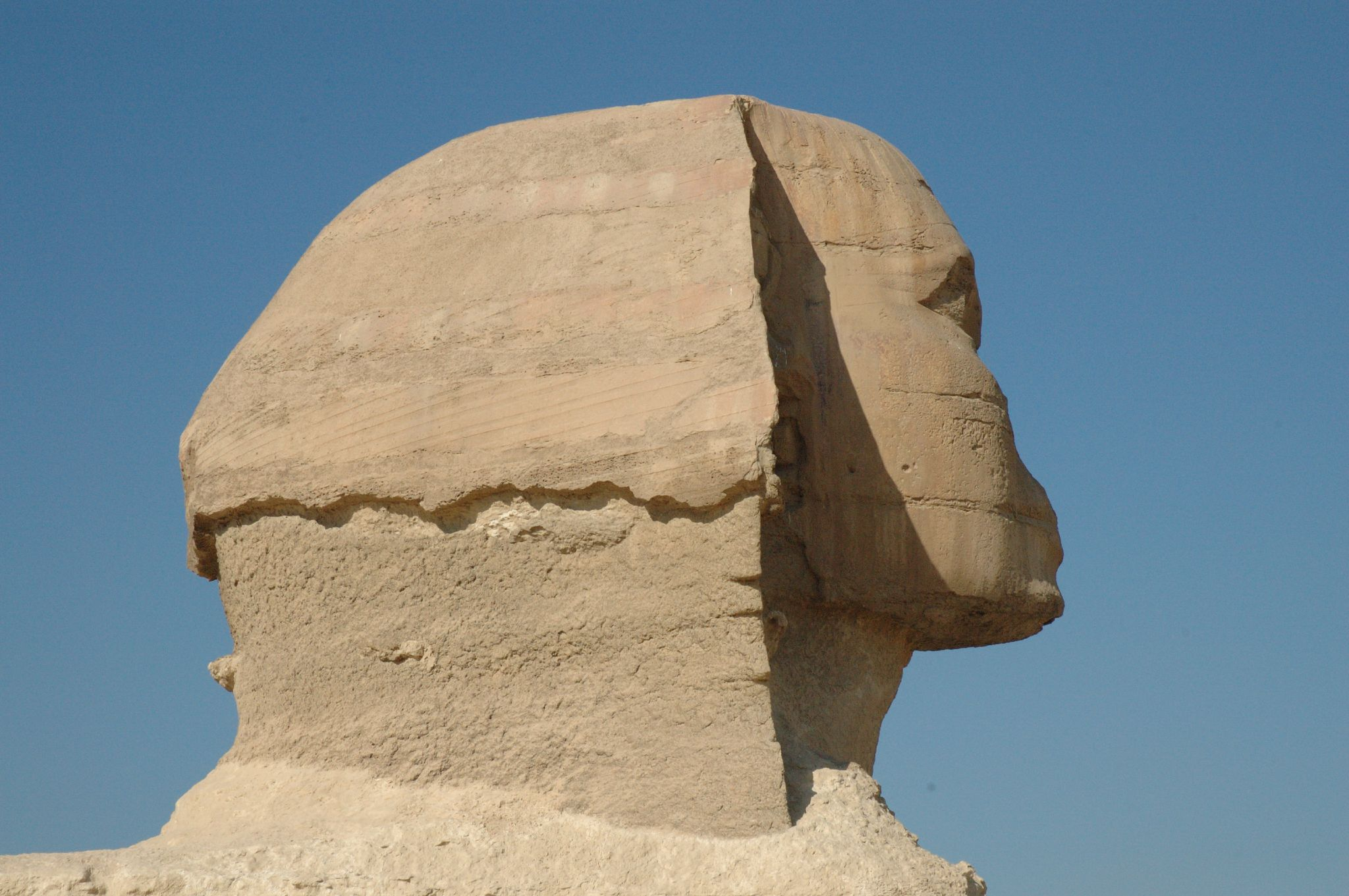 il modello del volto fu il faraone Chefren, ma la faccia della sfinge fu rovinata dagli artiglieri francesi che la usarono come bersaglio.